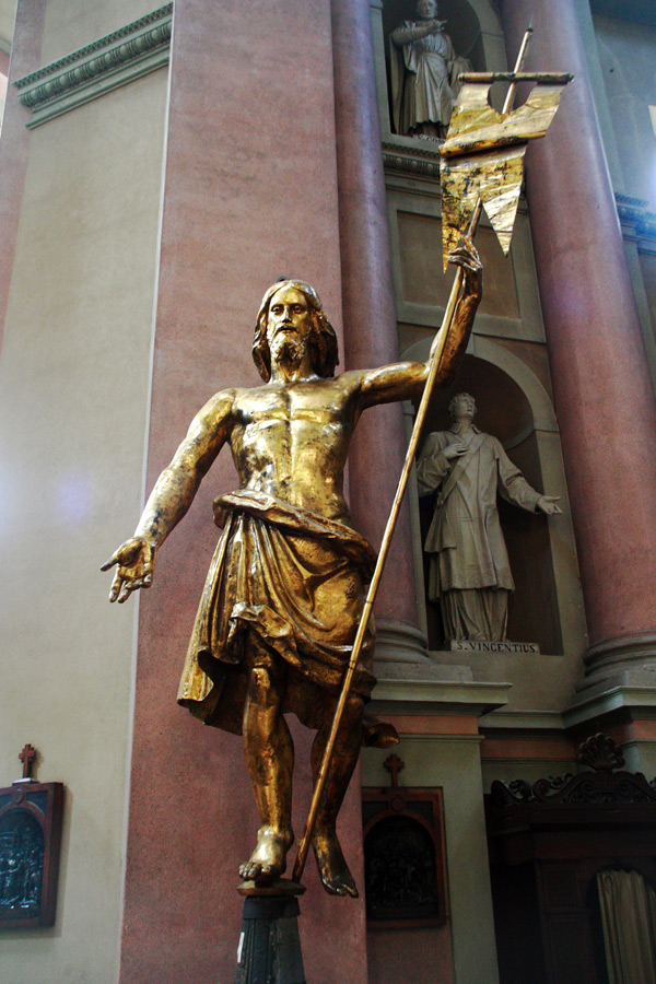 Originale statua del Salvatore posta sulla cima della cupola della Basilica di San Gaudenzio a Novara, oggi conservata nel transetto sinistro della chiesa.